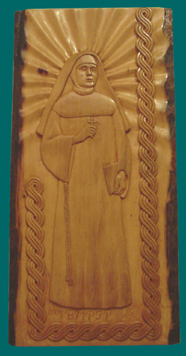 Marija Petkovic duborez u drvetu